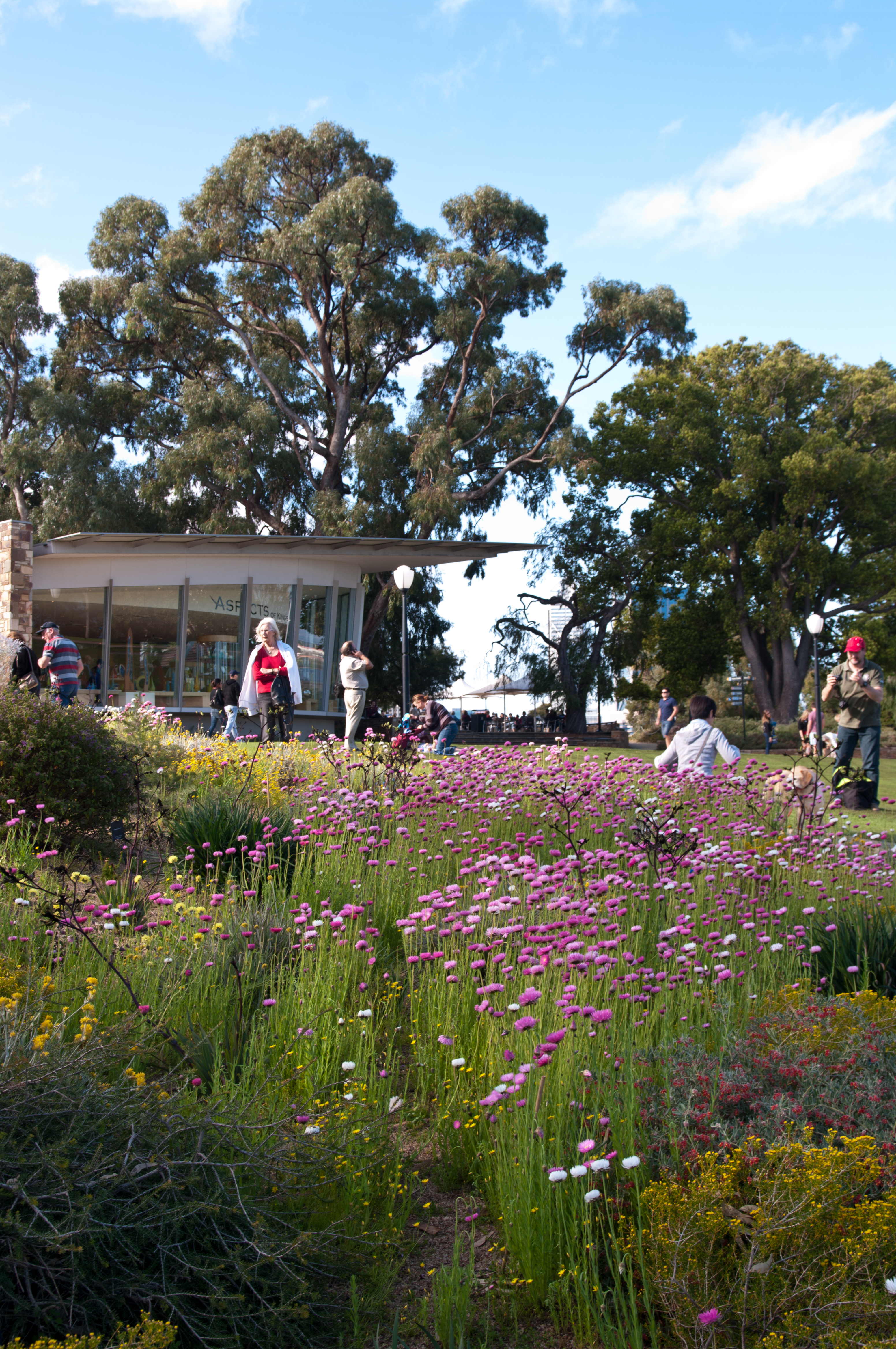 Kings Park, Western Australia